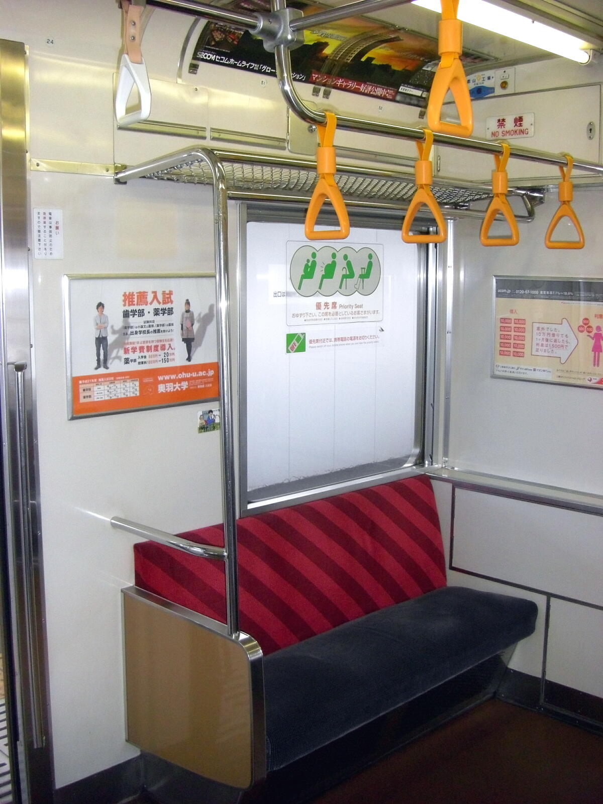 205系3100番台の優先席